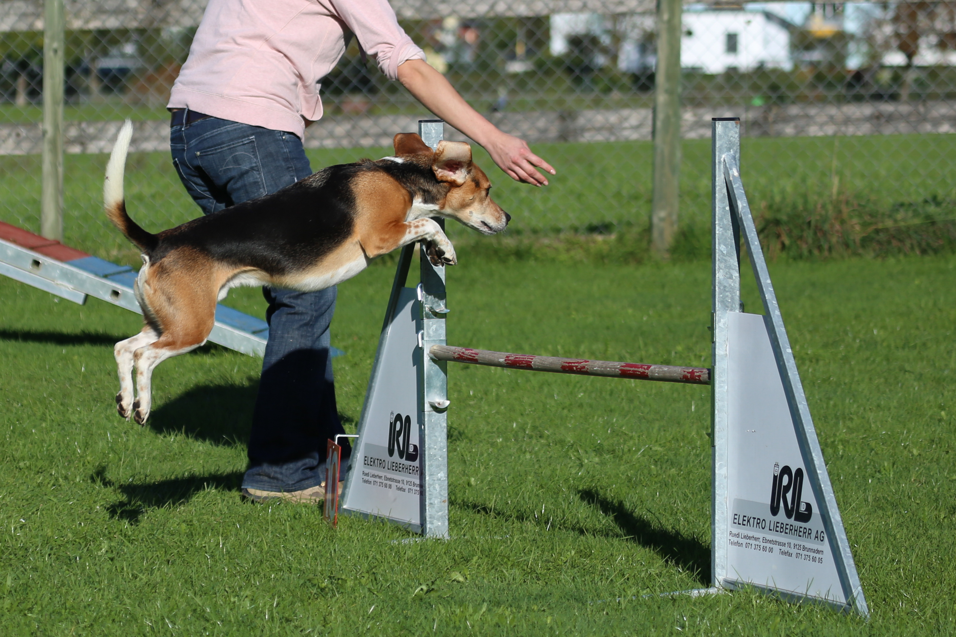 Agility-Wettkampf in der Ostschweiz – Beagle beim Sprung